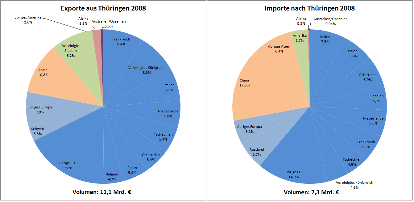 Außenhandel Thüringens im Jahr 2008 nach Daten des Statistschen Landesamtes.